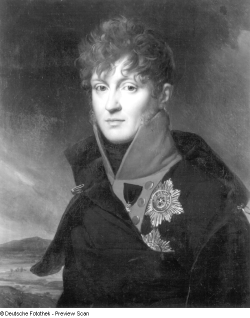 Erbprinz Friedrich Ludwig zu Mecklenburg (1778–1819)